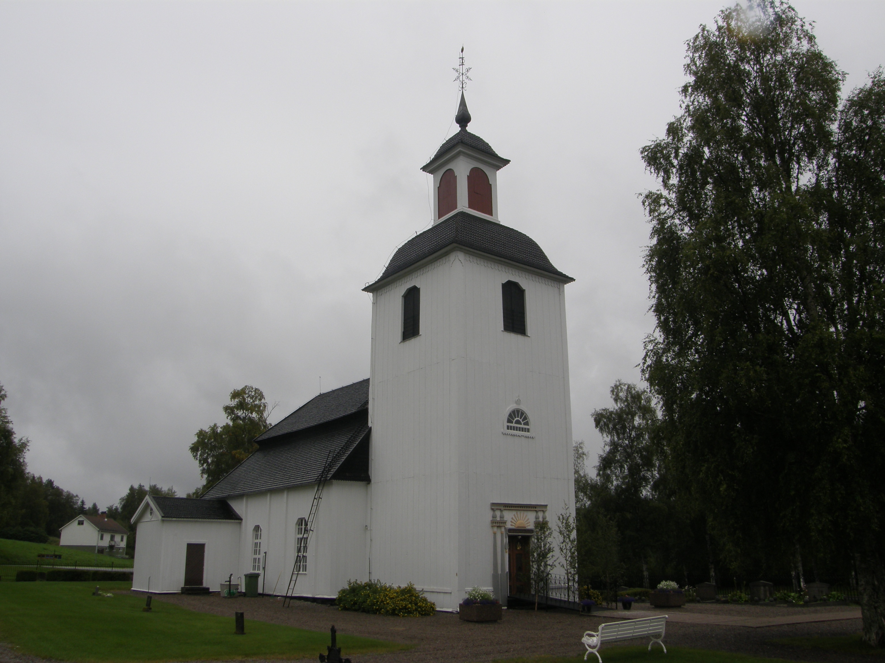 Linsells kyrka byggd 1778 av Pehr Tholsson.